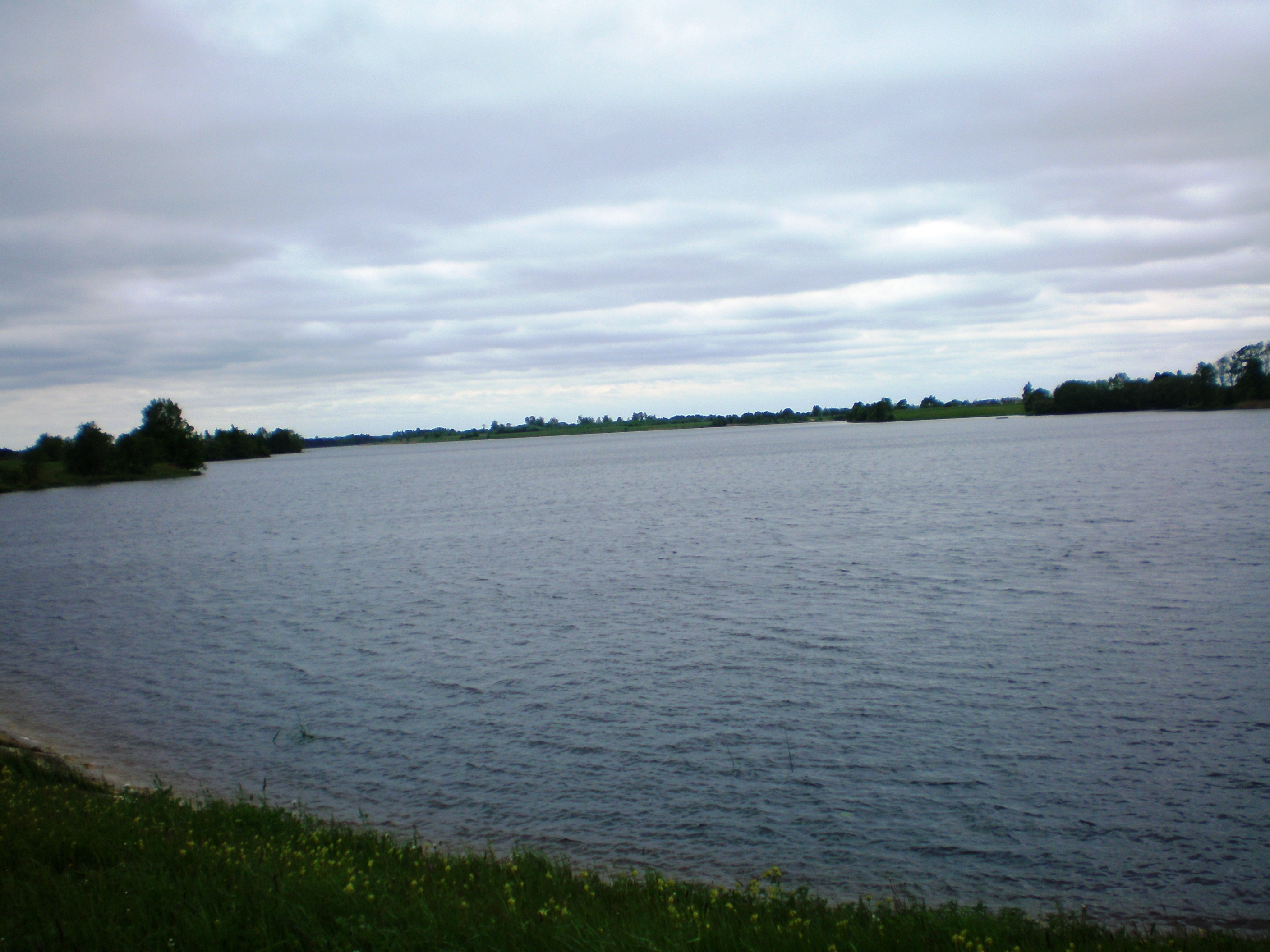 Angriai Lake, Lithuania